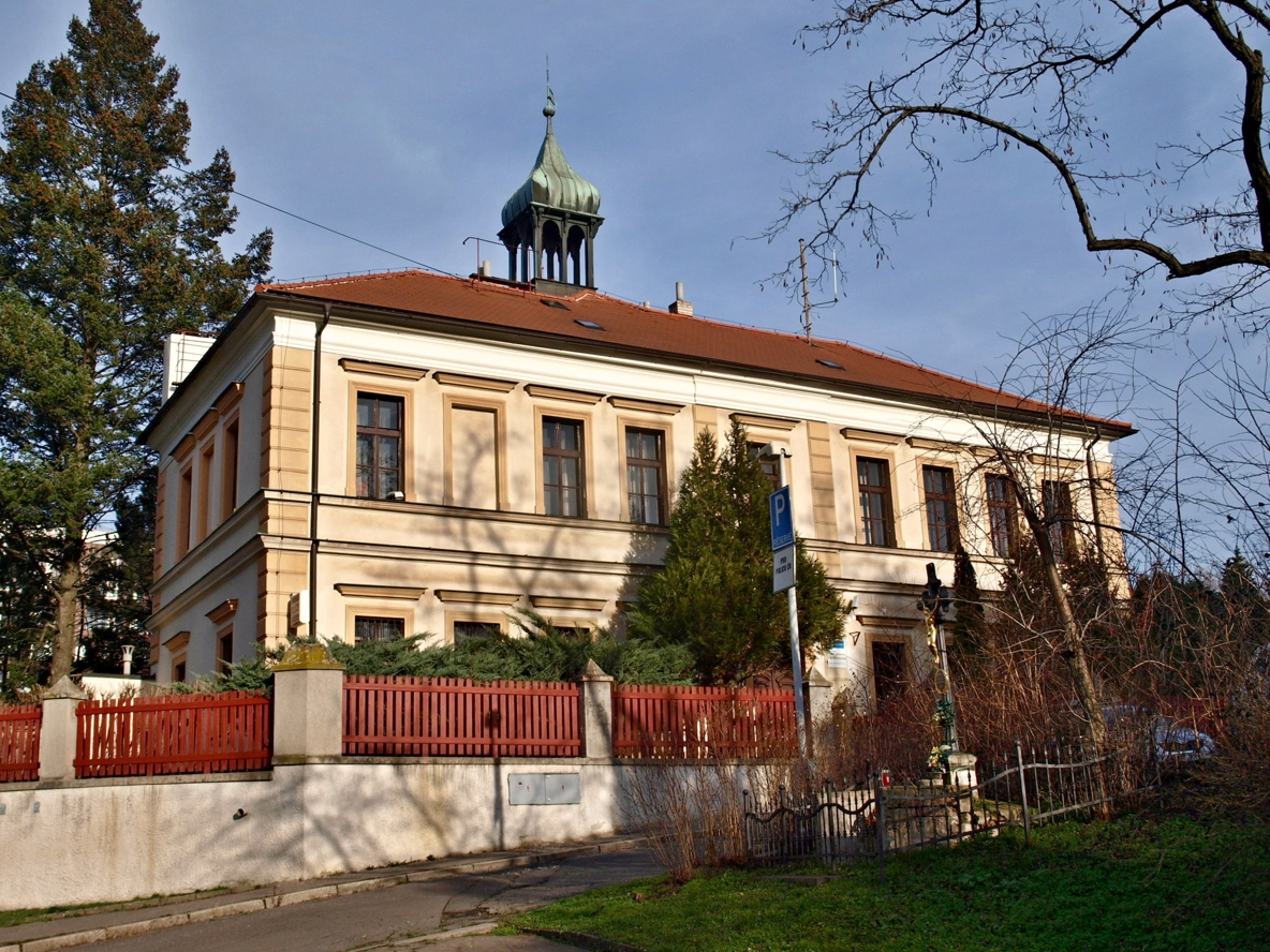 Strašnice, zámeček